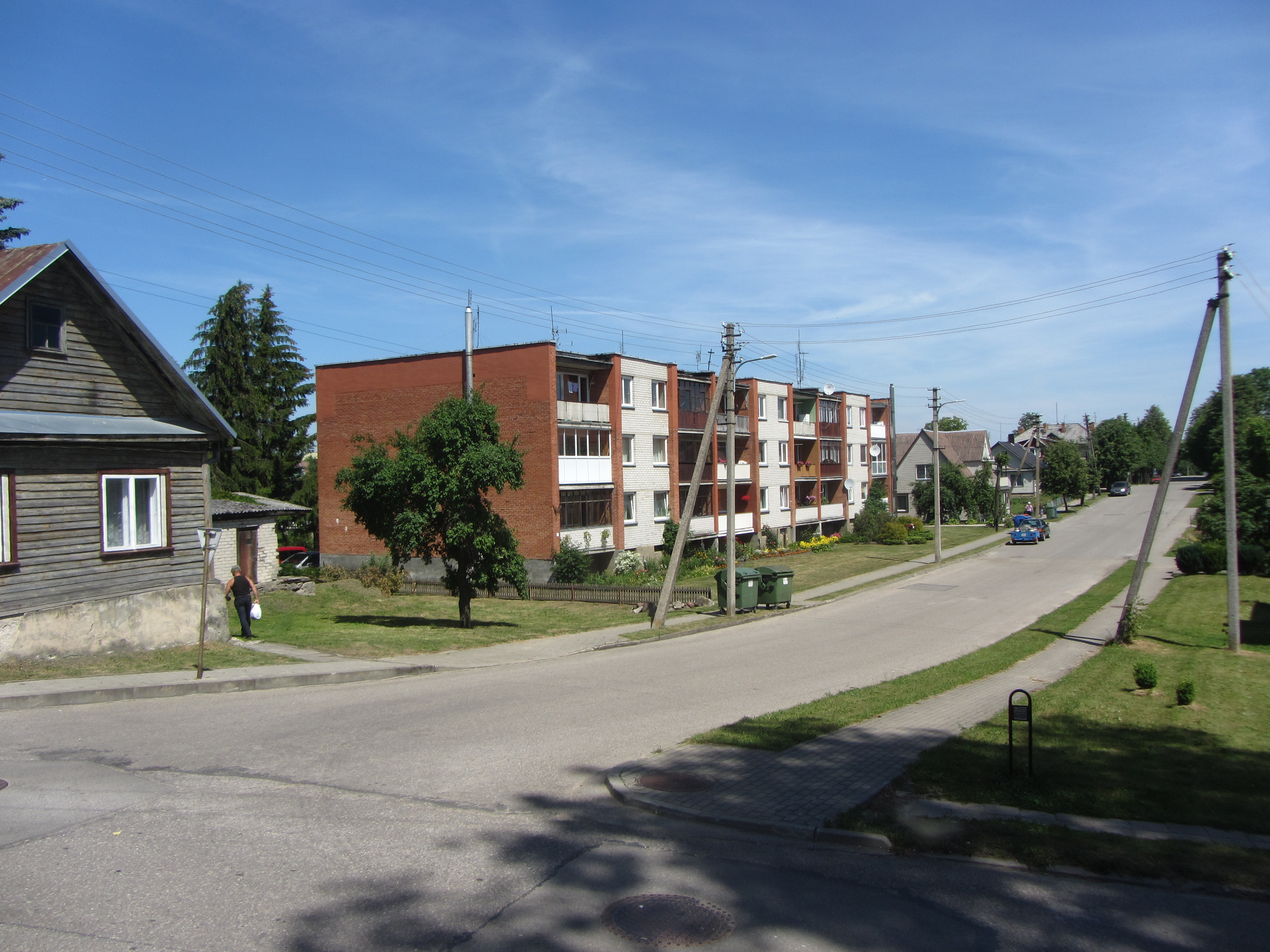 Daugai, Lithuania